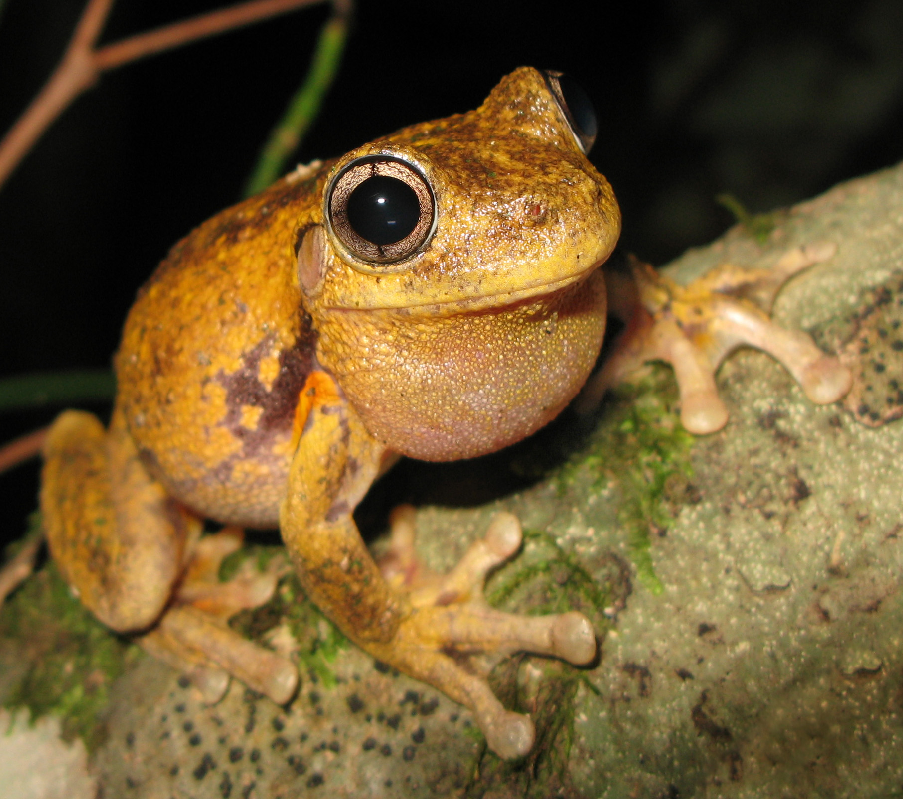 Peron's Tree Frog (Litoria peronii)